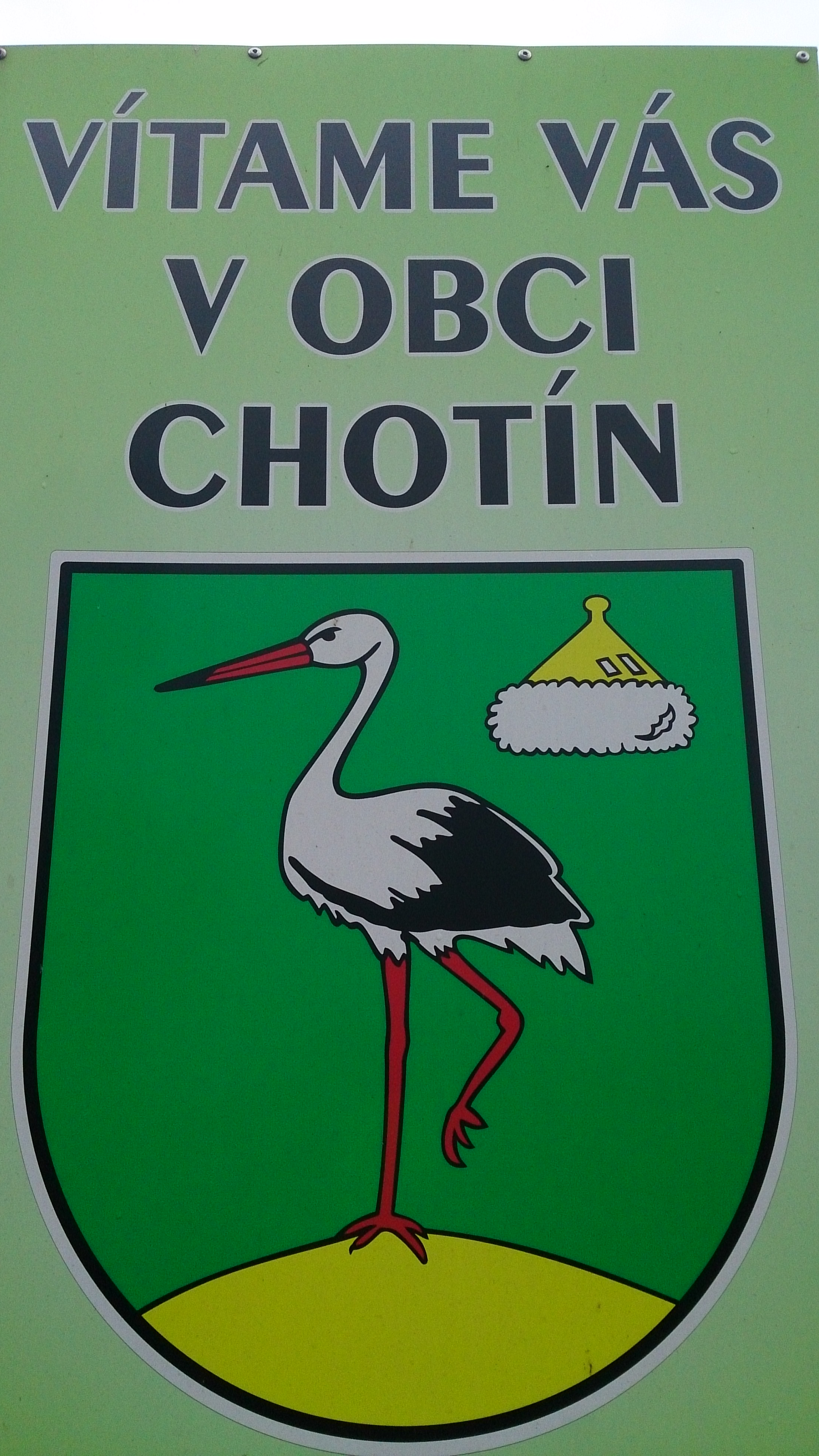 Chotin Okres Komarno